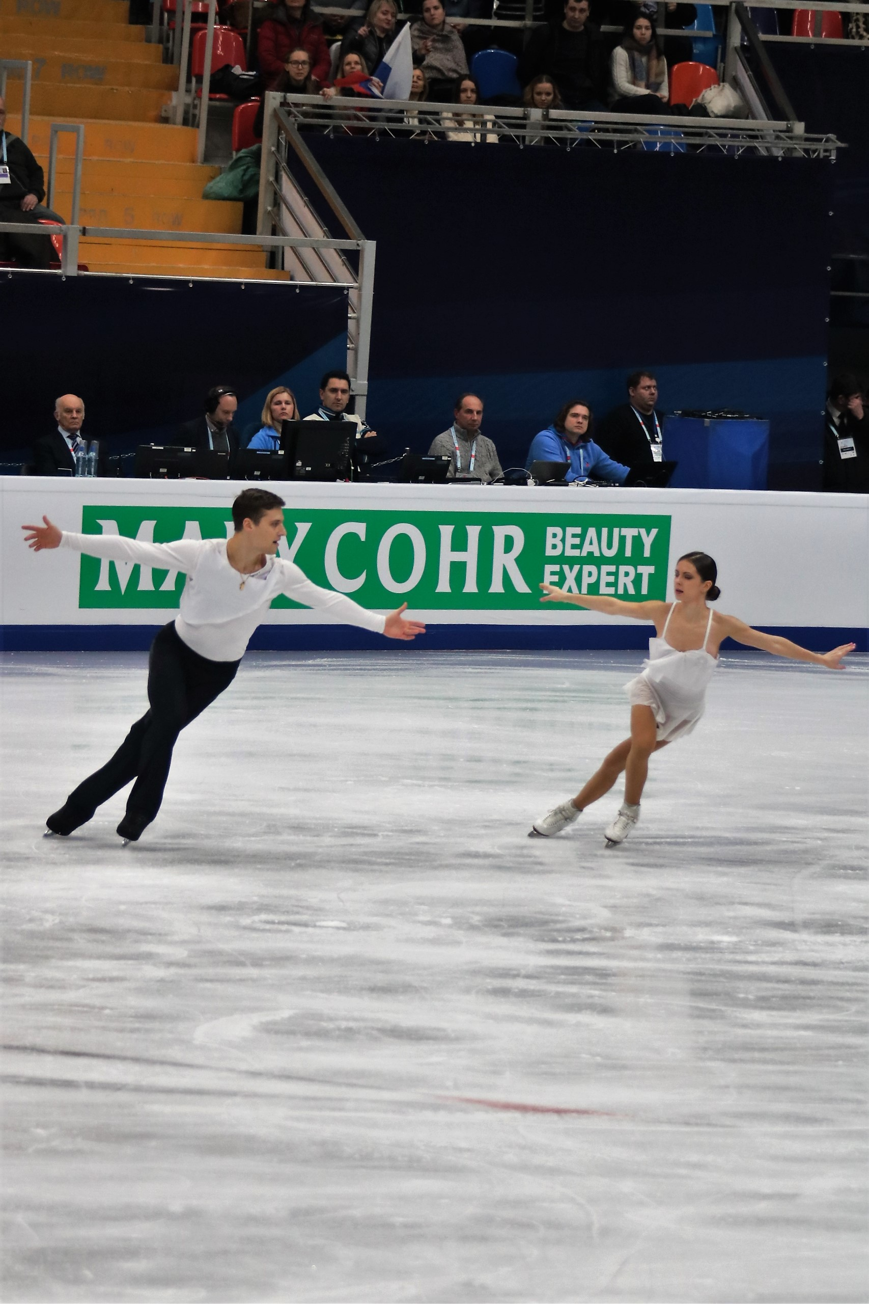 Наталья Забияко / Александр Энберт (Россия) на Чемпионате Европы по фигурному катанию 2018.